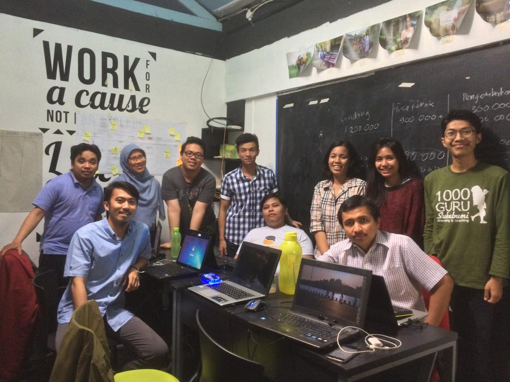 Jezzie dan tim di tahun kedua GT